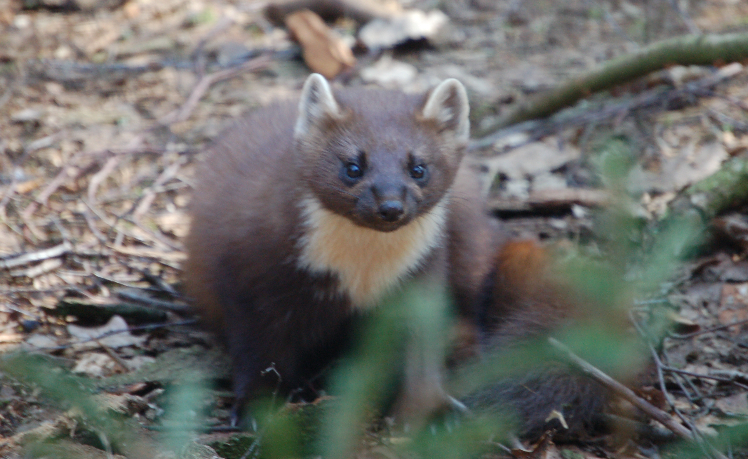 Baummarder (Martes martes) im Wildpark Eekholt.